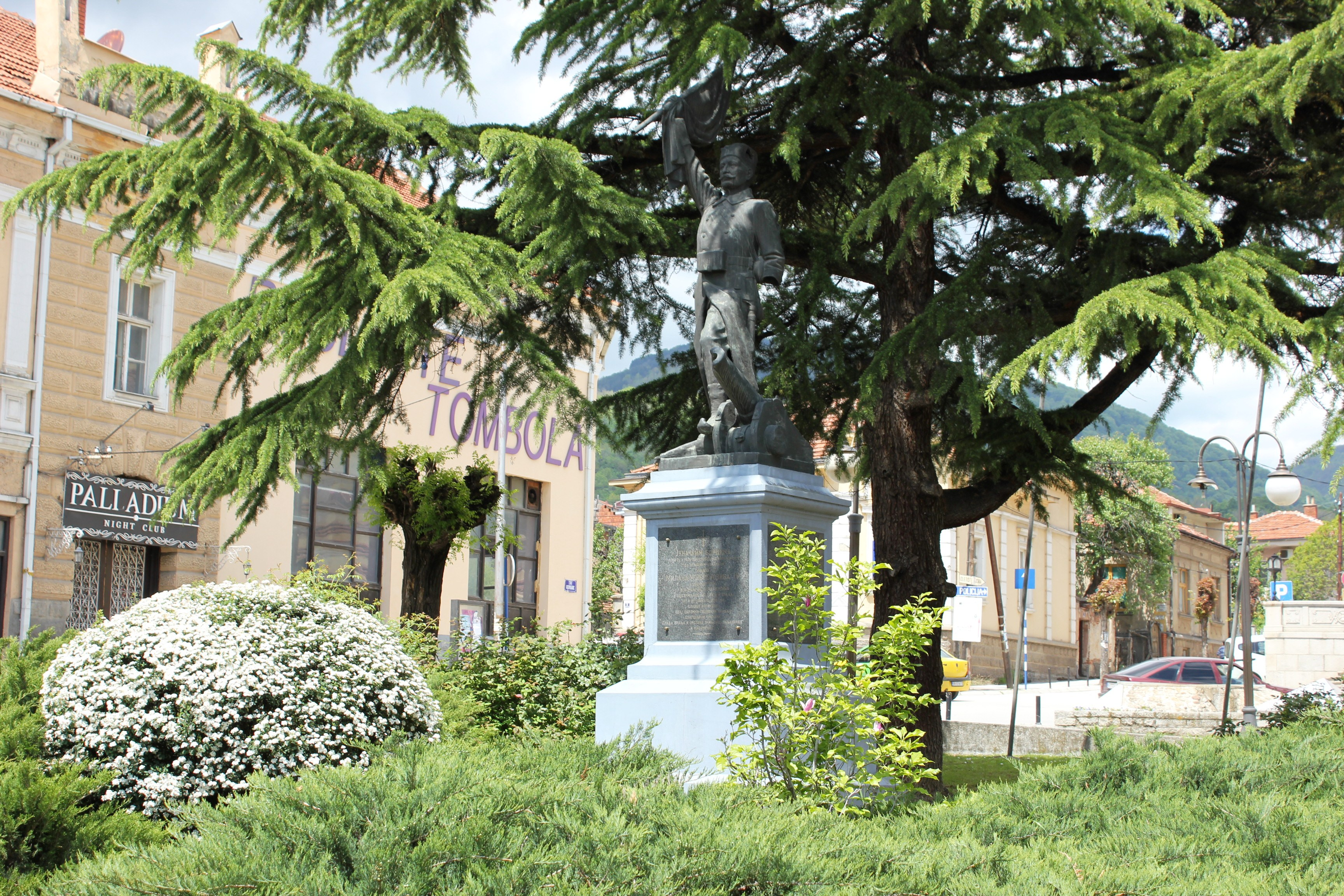 Военен паметник в град Враня, Сърбия.